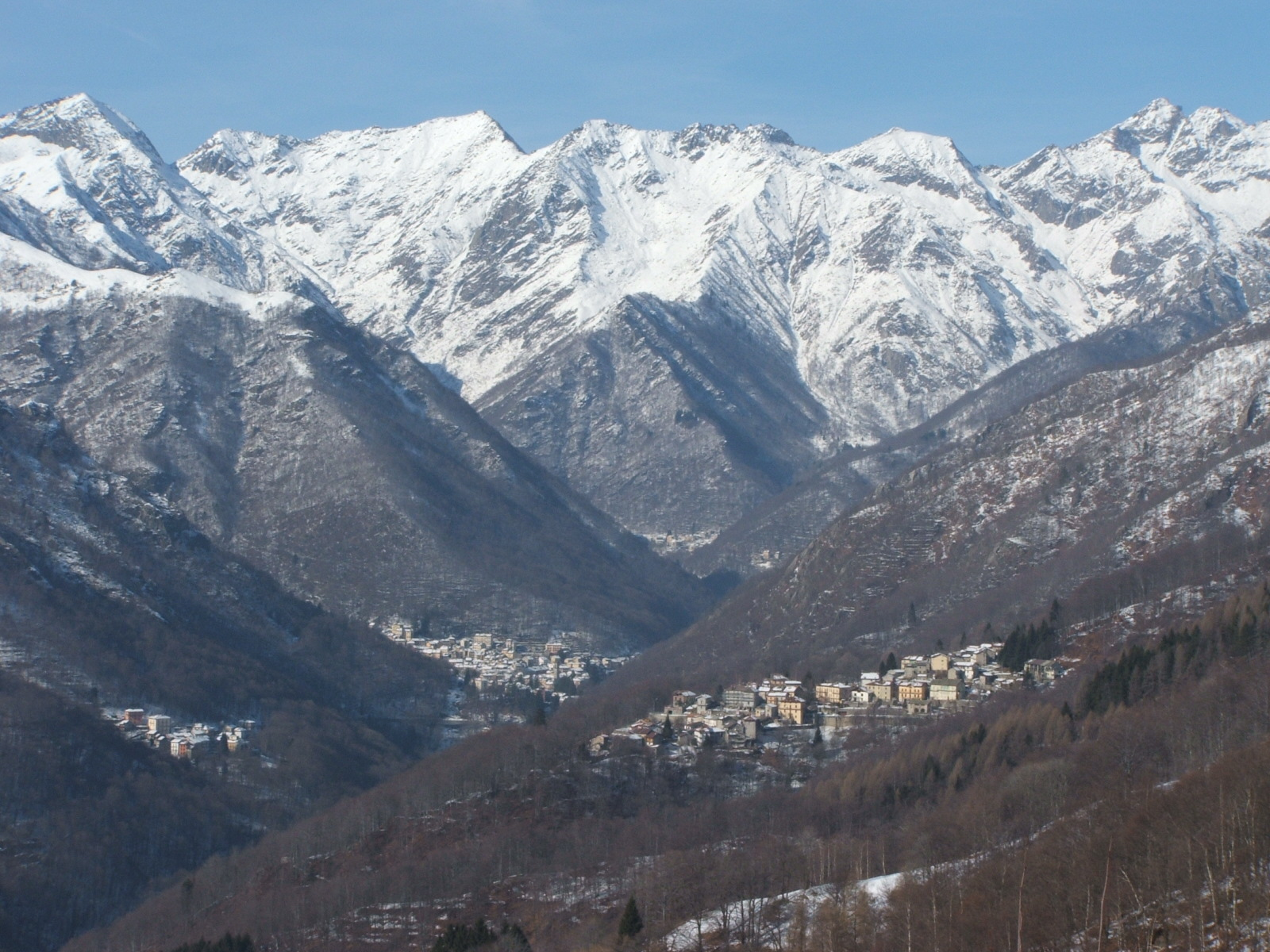 Valle Cervo in inverno (provincia di Biella, Piemonte, Italia)